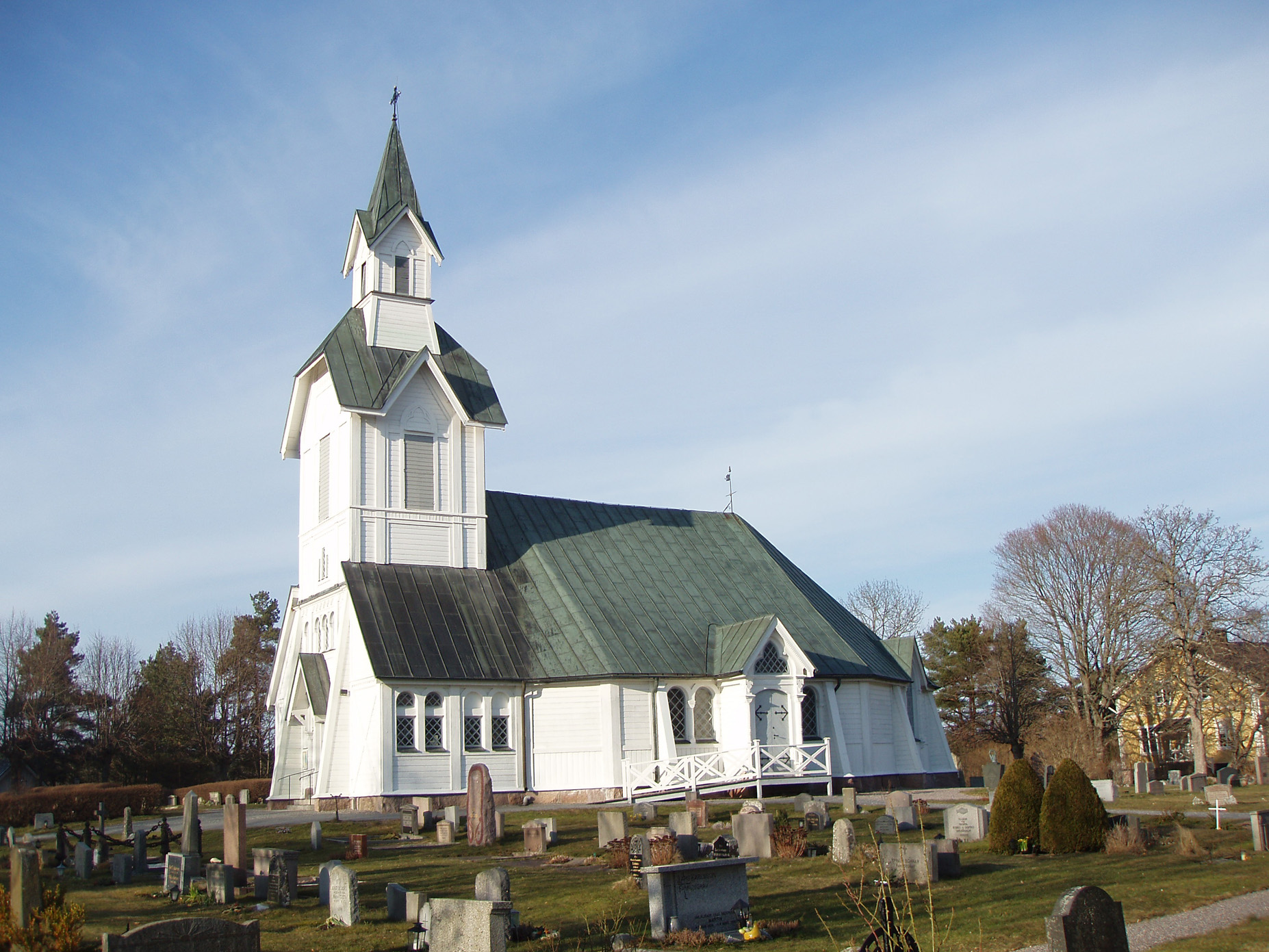 Ljusterö kyrka. Träkyrka ombyggd 1894 efter ritningar av Hjalmar Kumlien. The church of Ljusterö, Sweden. A wooden church built in 1894.